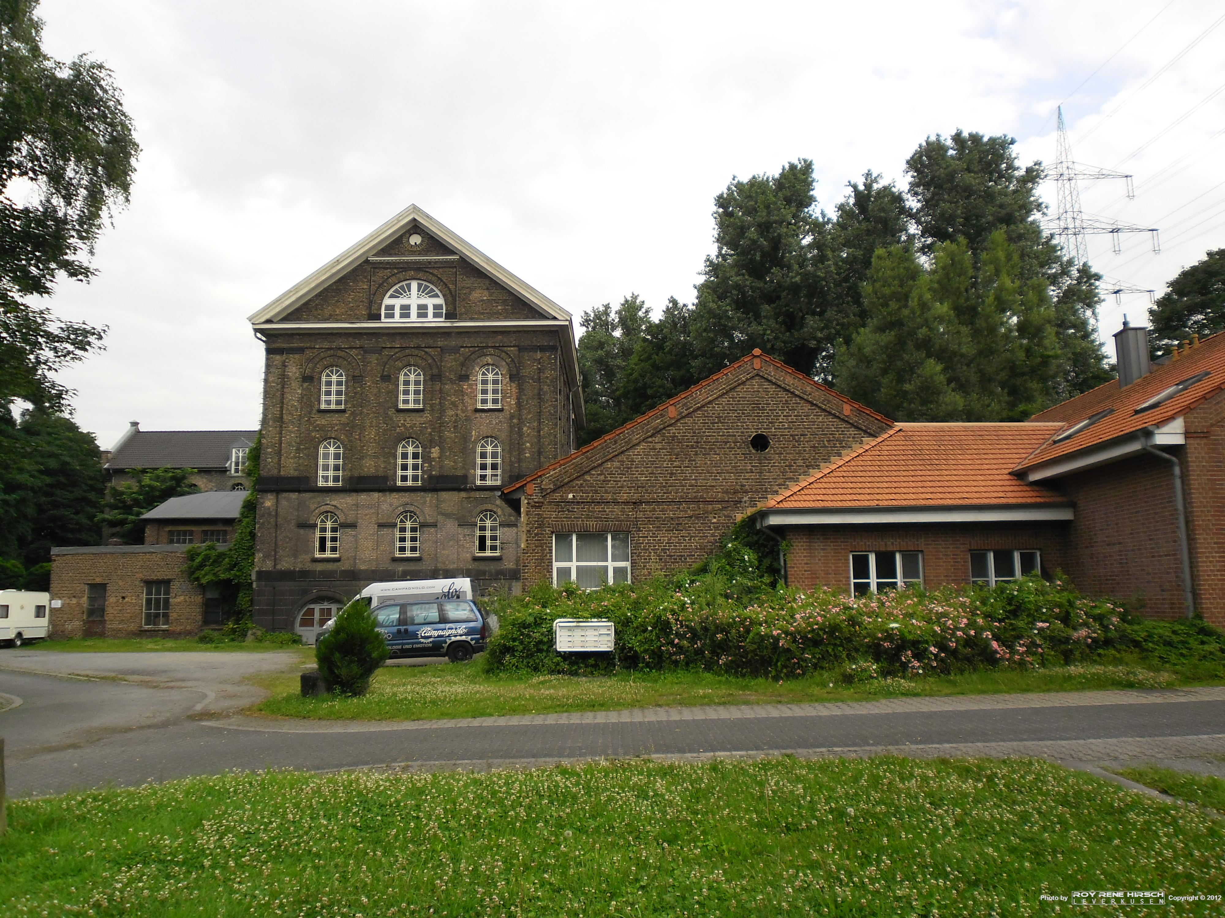 Baudenkmal: Leverkusen-Bürrig, Reuschenberger Mühle.